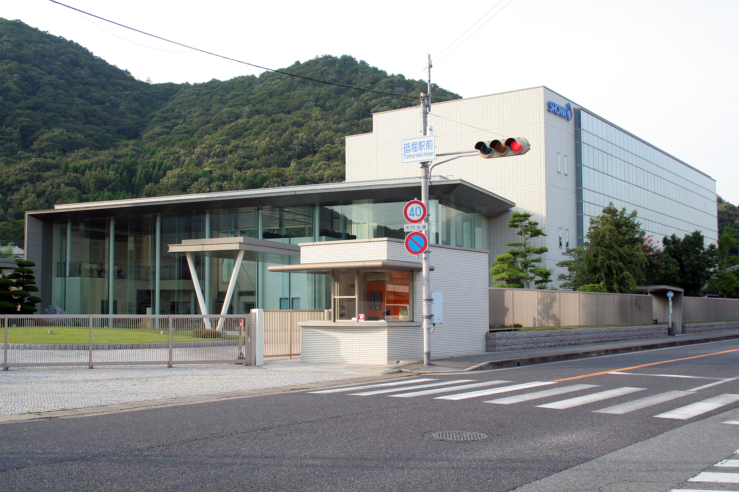 主に姫路市内の店舗の画像。そして飲食物。 ショーワグローブ本社社屋。